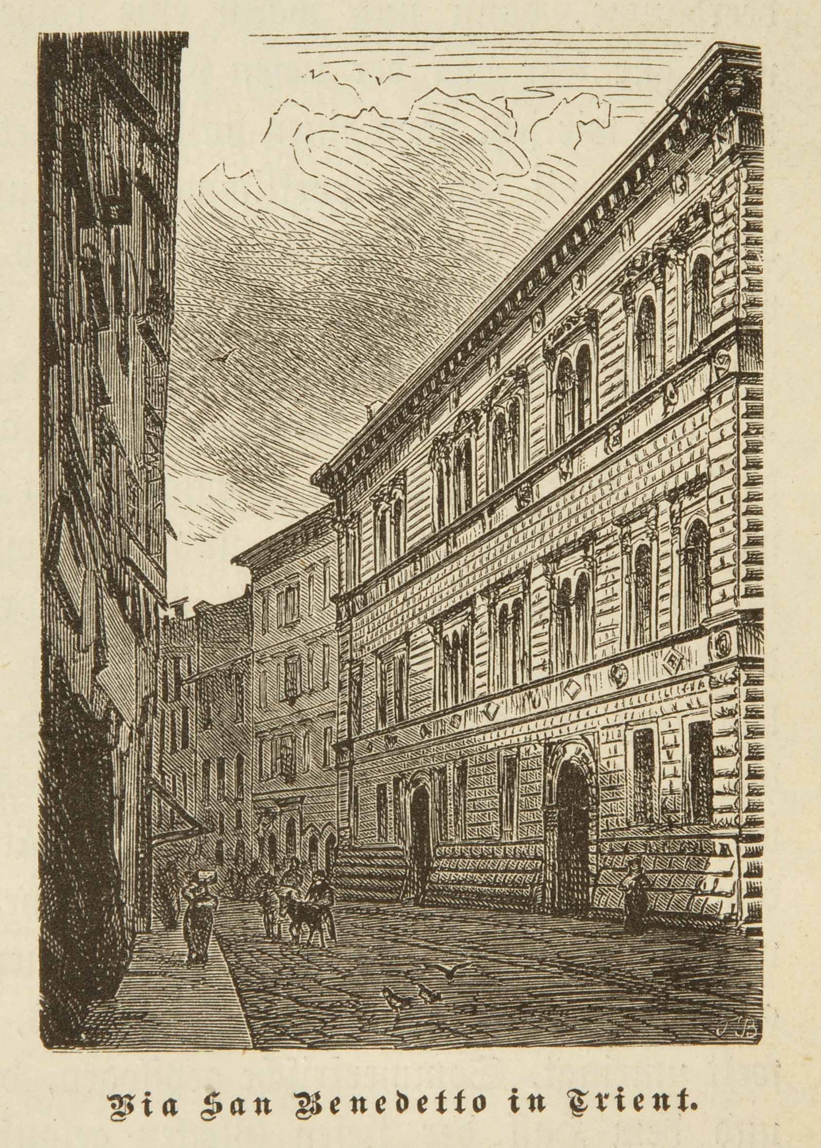 Calcografia. Disegno di Theodor Blätterbauer, pubblicata in Heinrich Noé, Tirol und Vorarlberg Naturansichten und Gestalten, Glogau, Flemming, 1878.